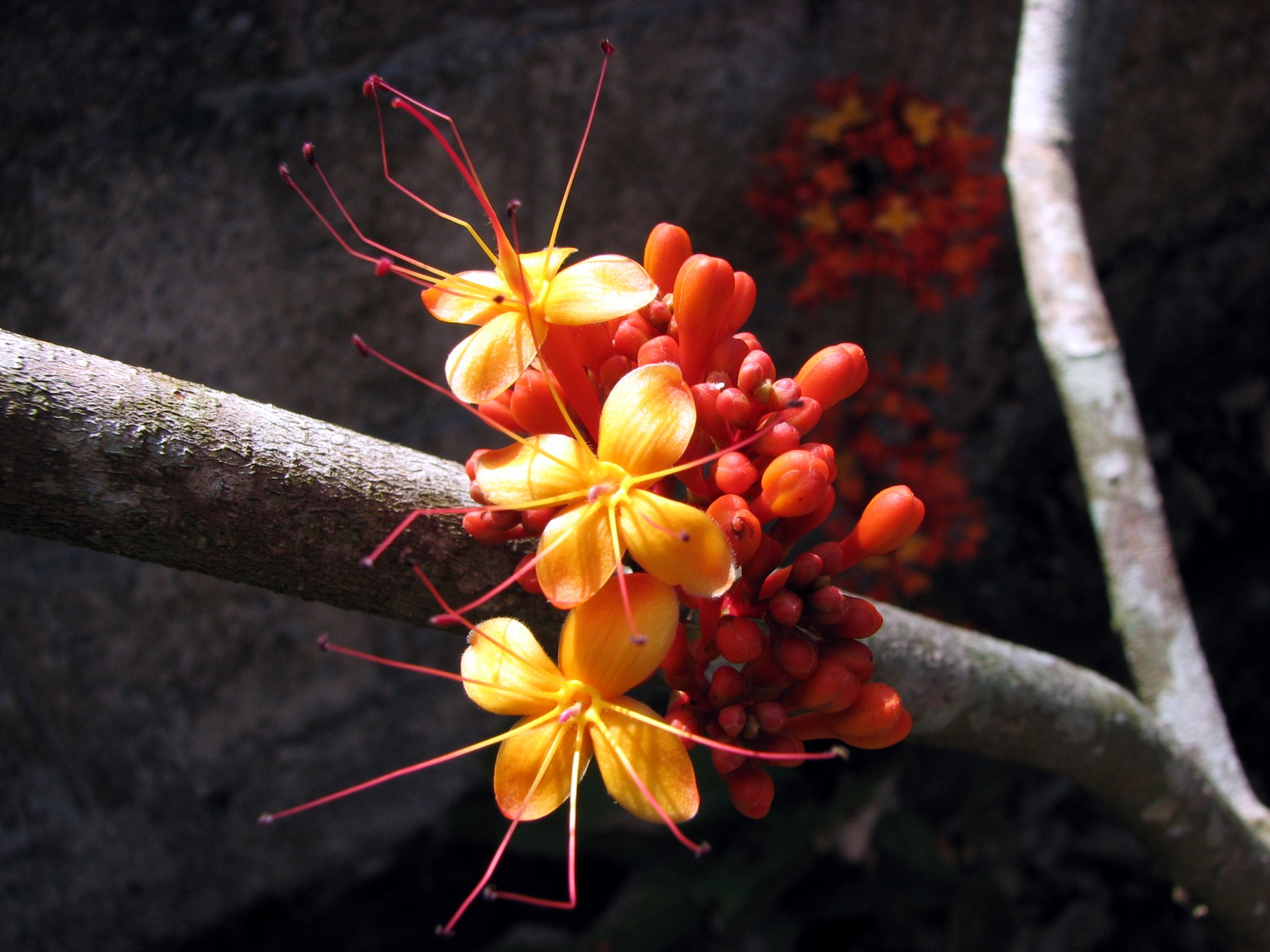 അശോക പുഷ്പം